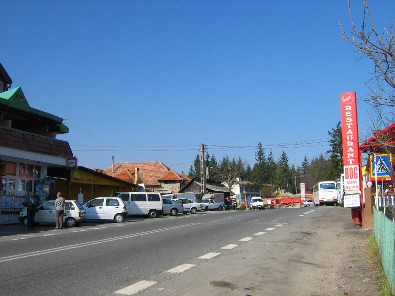 DN1-es főút a Király-hágónál (Románia)